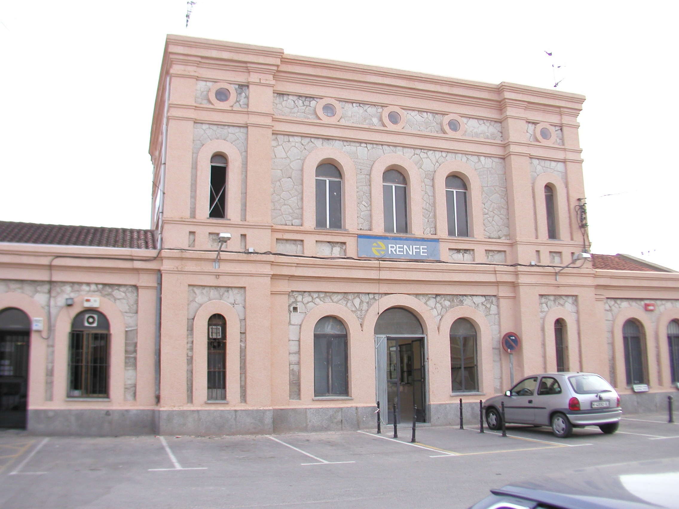 Estación de ferrocarriles de Torrijos (Toledo)